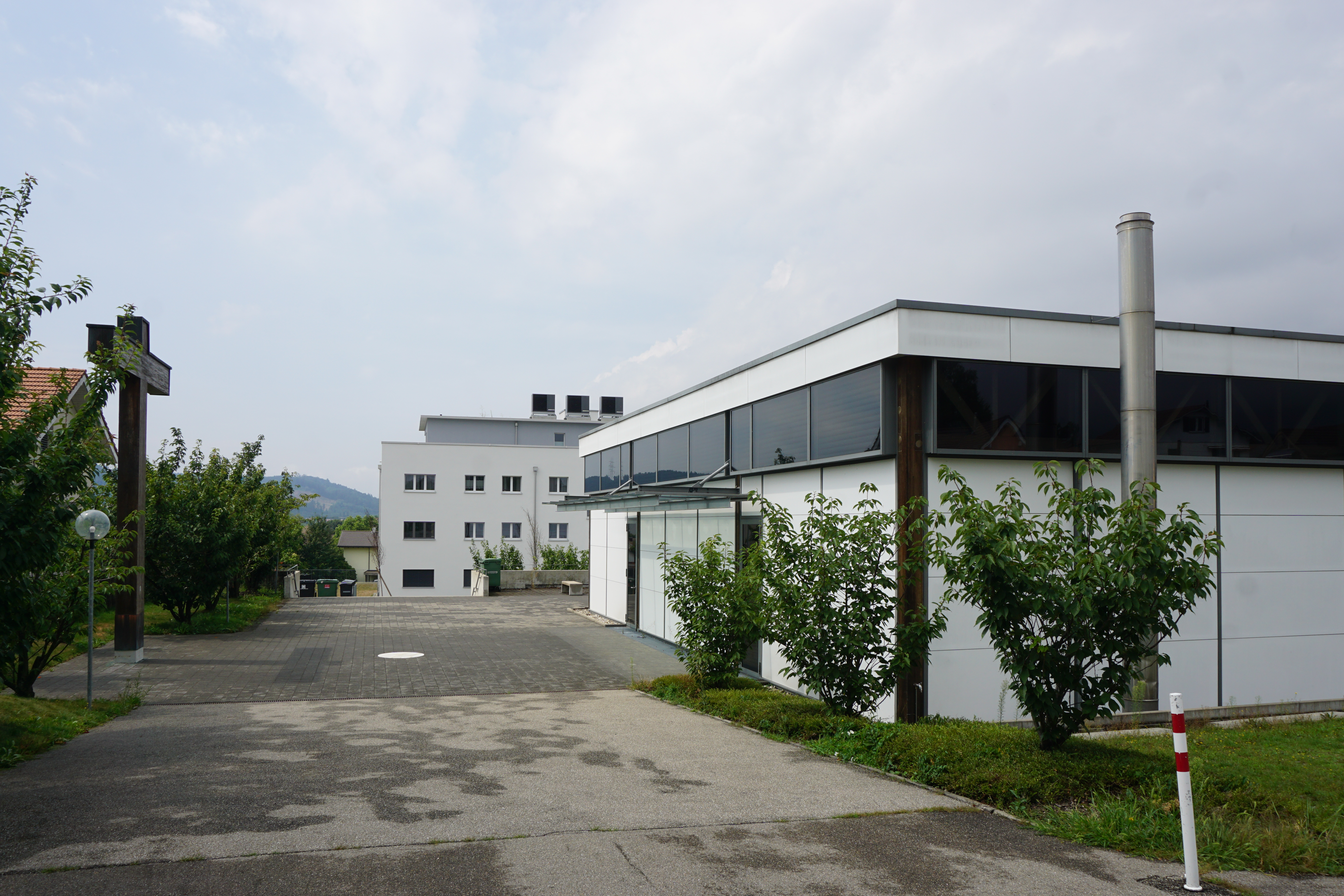 Kirche St. Martin, Lengnau. Eingangseite